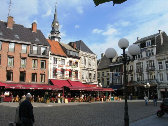 Grote markt te Hasselt (België) - eigen foto